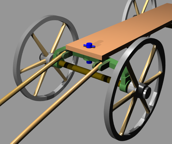 Direction d'un véhicule hippomobile par cheville ouvrière Personal drawing made with Hamapatch+Povray